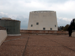 יד לילד, מוזיאון להנצחת הילדים שנספו בשואה, קבוץ he:לוחמי הגטאות בתכנון האדריכל he:רם כרמי (1981-1990).